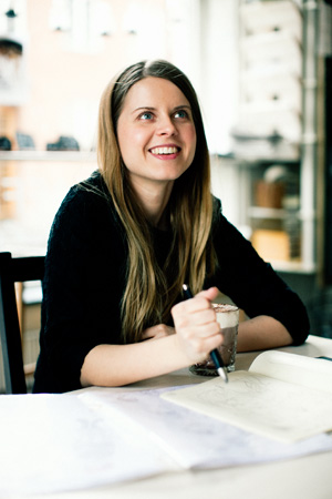 Lina Neidestam, fotografert av Oskar Kullander